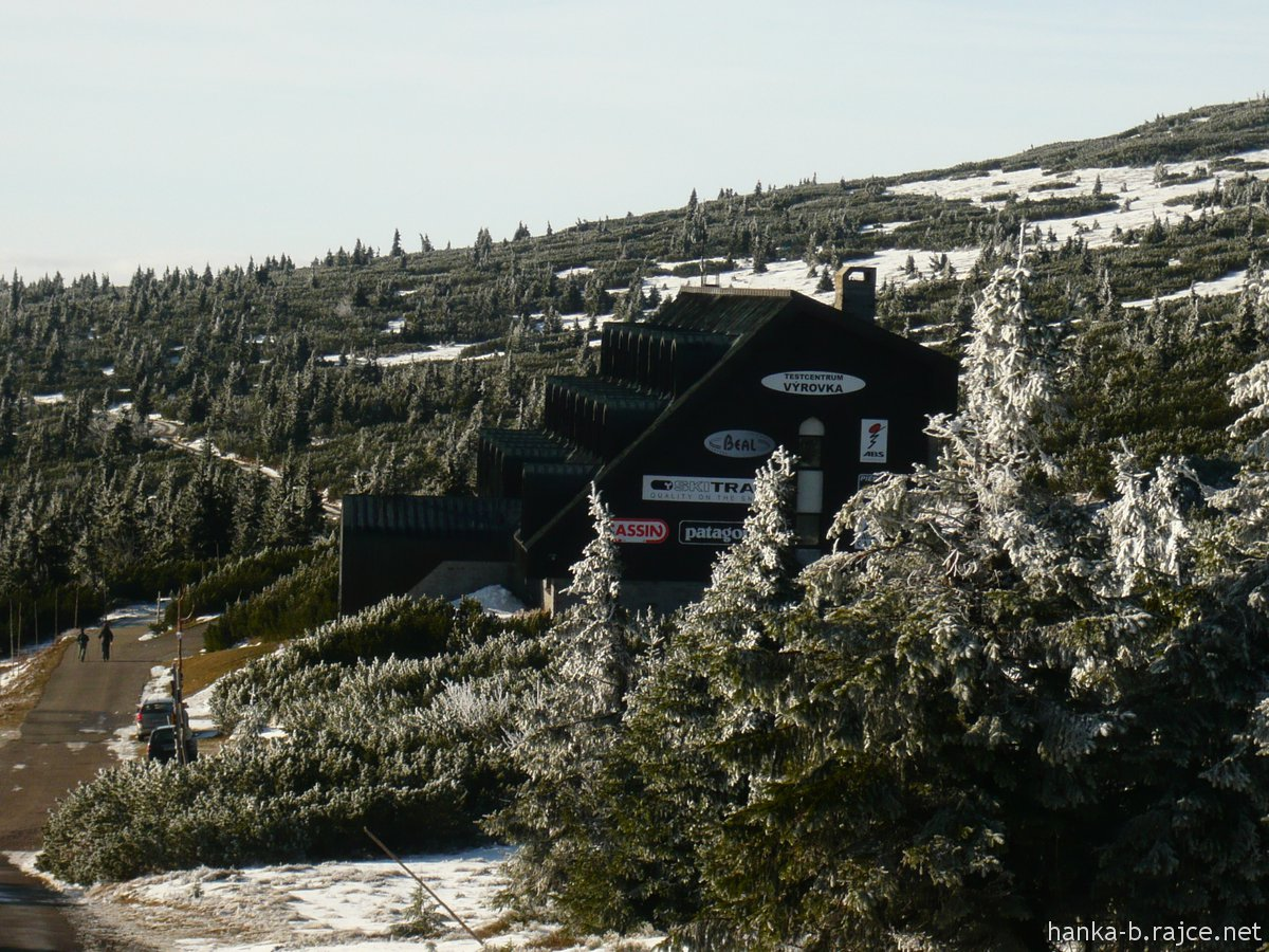 Chata Výrovka současnost - podzim